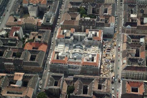 Garay tér ma - Budapest - Hungary - Europe